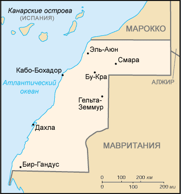 Карта-схема Западной Сахары